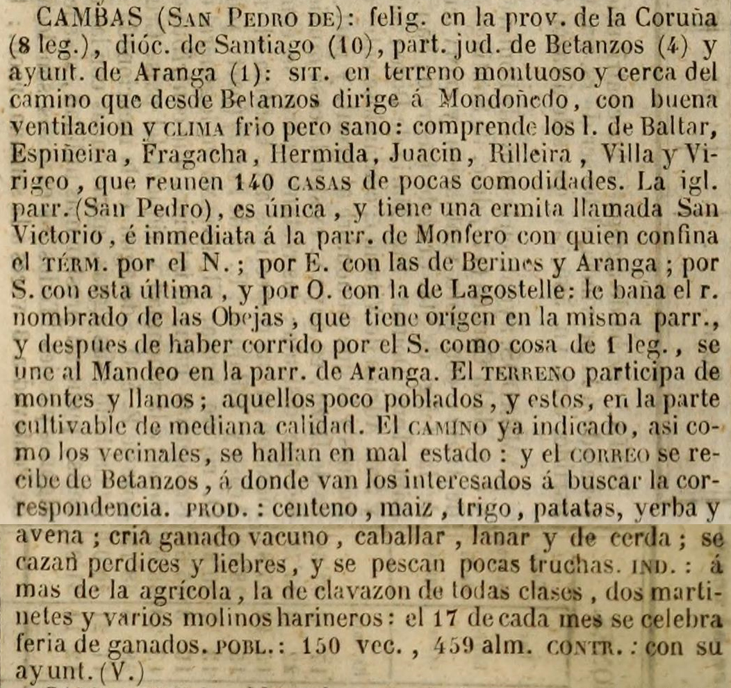 Cambás no Diccionario geográfico-estadístico-histórico de España y sus posesiones de Ultramar.